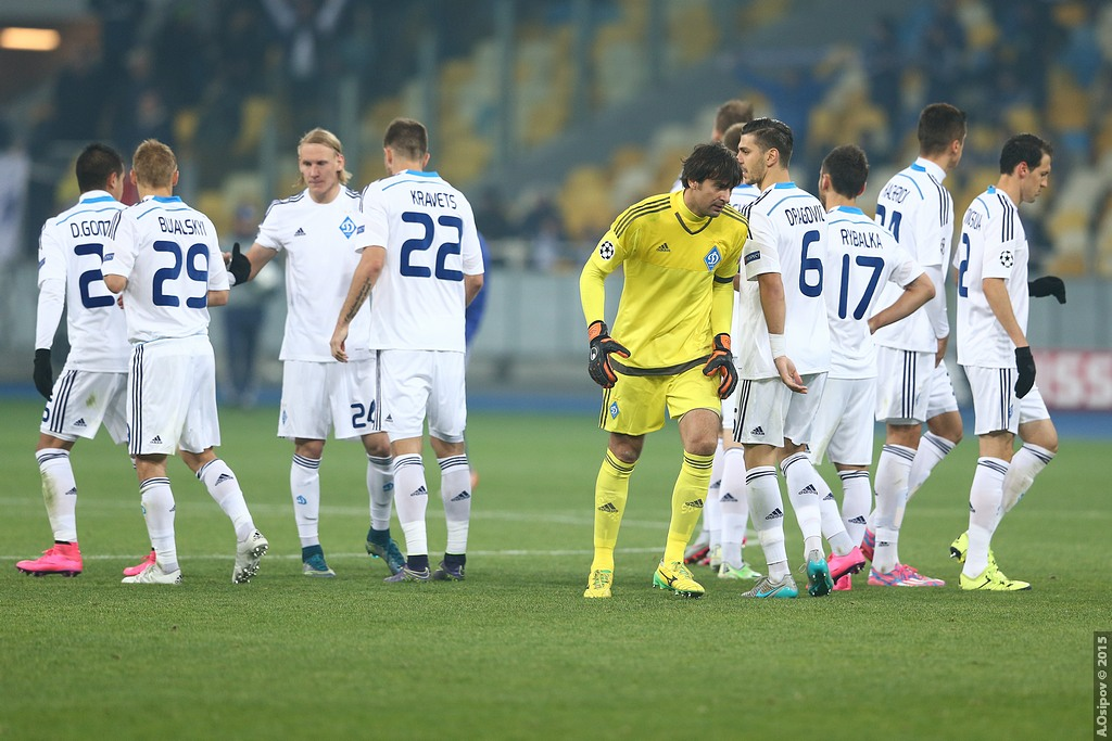 20.10.2015 Kyiv, Olimpiyskiy National Sports Complex Champions League. Group stage. FC Dynamo Kyiv - Chelsea - 0:0 Chelsea (4-2-3-1): Begovic; Zouma, Cahill, JT (c), Azpilicueta; Ramires, Matic; Willian, Fabregas (Oscar 75), Hazard; Diego Costa. Unused subs Blackman, Baba, Mikel, Traore, Kenedy, Falcao. Booked Zouma 67 Dynamo Kiev (4-1-4-1): Shovkovskiy; Danilo Silva, Khacheridi, Dragovic, Vida; Rybalka; Yarmolenko, Sydorchuk, Buyalskiy (Garmesh 83), Gonzalez; Kravets (Junior Moraes 78). Unused subs Rybka, Antunes, Petrovic, Gusev, Miguel Veloso. Booked Buyalskiy 65 20.10.2015 г.Киев. НСК "Олимпийский". Лига Чемпионов. Групповой этап Динамо — Челси 0:0 Динамо: Шовковский — Данило Силва, Драгович, Хачериди, Вида — Рыбалка, Буяльский (Гармаш, 83) — Ярмоленко, Сидорчук, Гонсалес — Кравец (Мораес, 78) Челси: Бегович — Аспиликуэта, Терри, Кэхилл, Зума — Матич, Рамирес — Виллиан, Фабрегас (Оскар, 75), Азар — Д. Коста Предупреждения: Буяльский — Зума